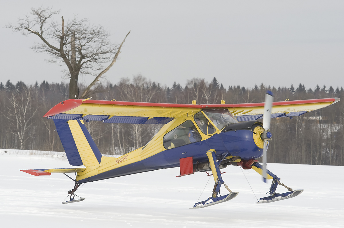 Wilga35a RA-0274g landing